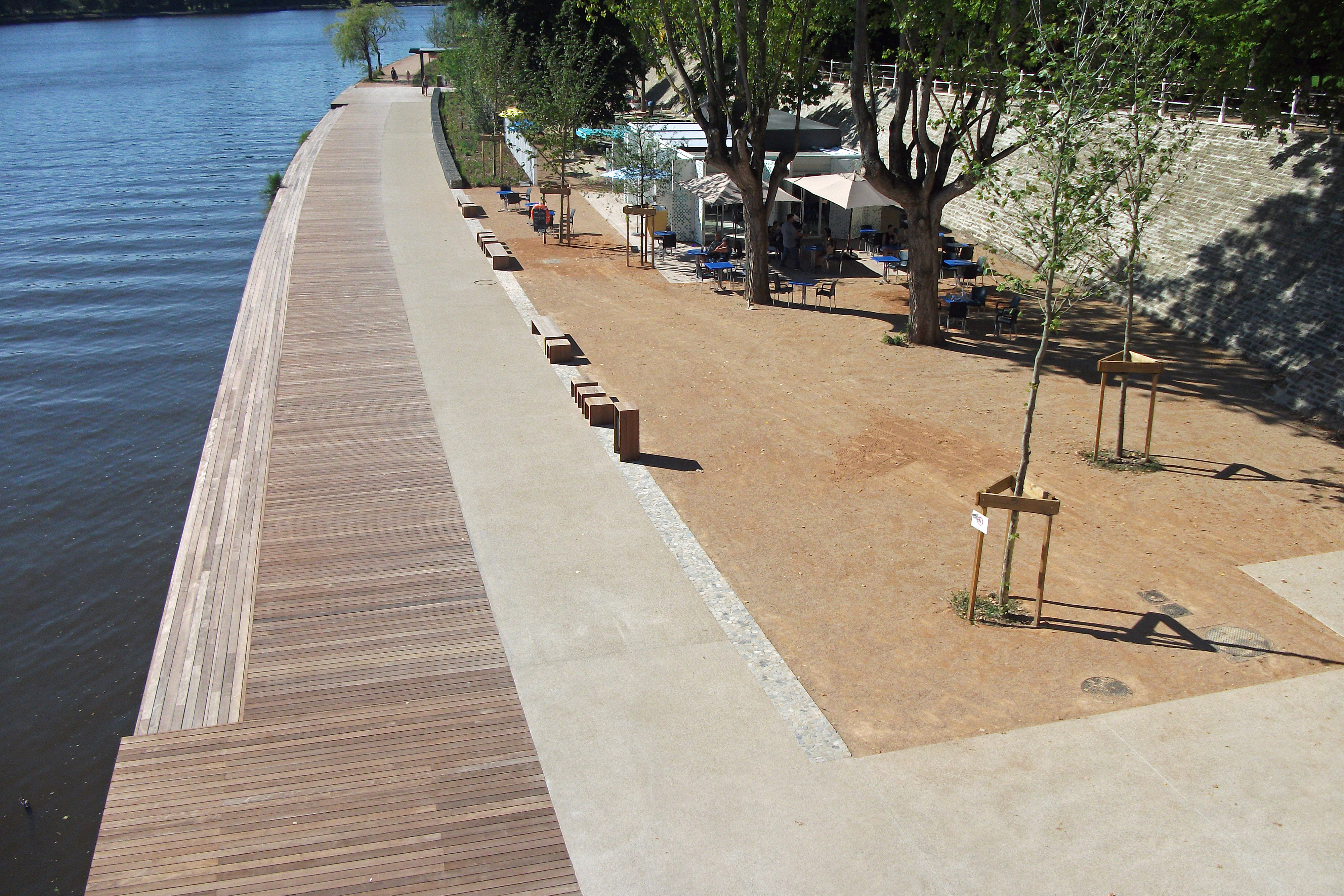 Berges de l'Allier rénovées en aval du pont de Bellerive.